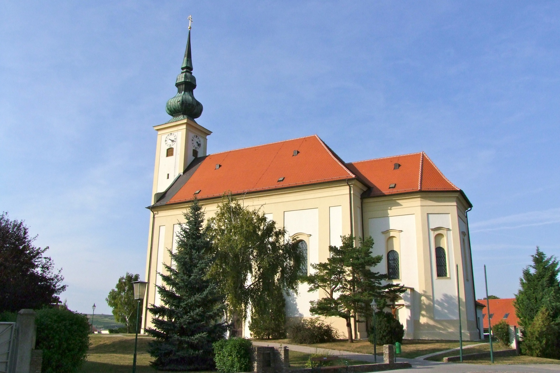 Kath. Pfarrkirche hl. Markus